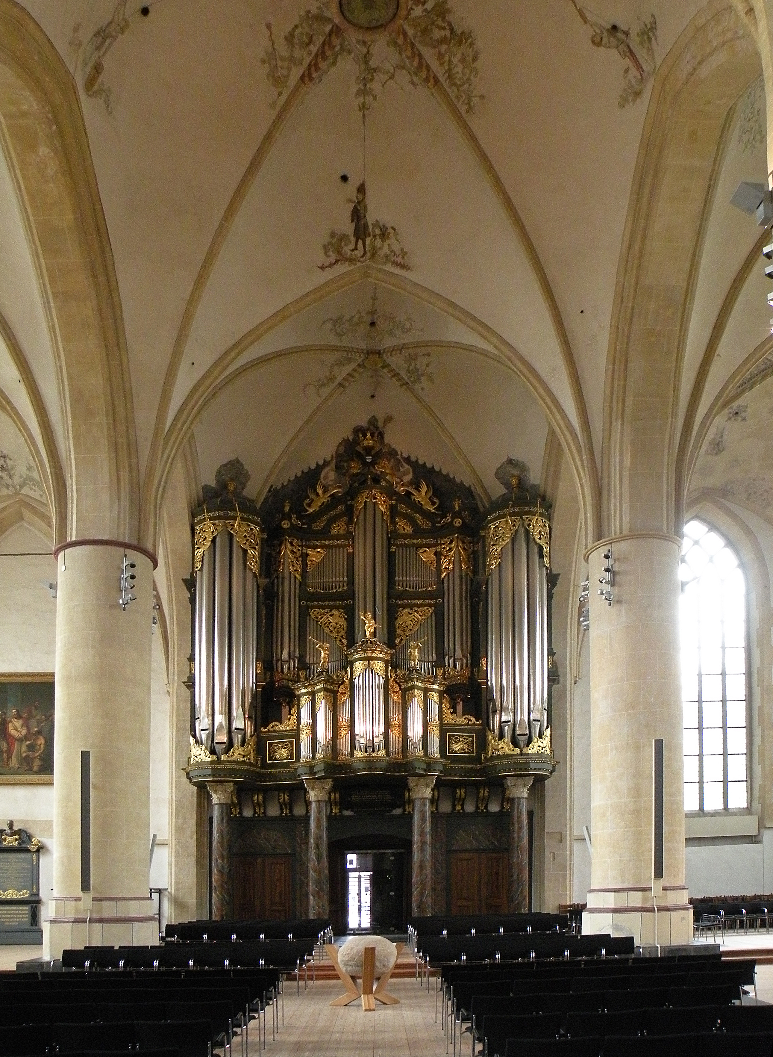 Groningen. Martinkirche.Orgel